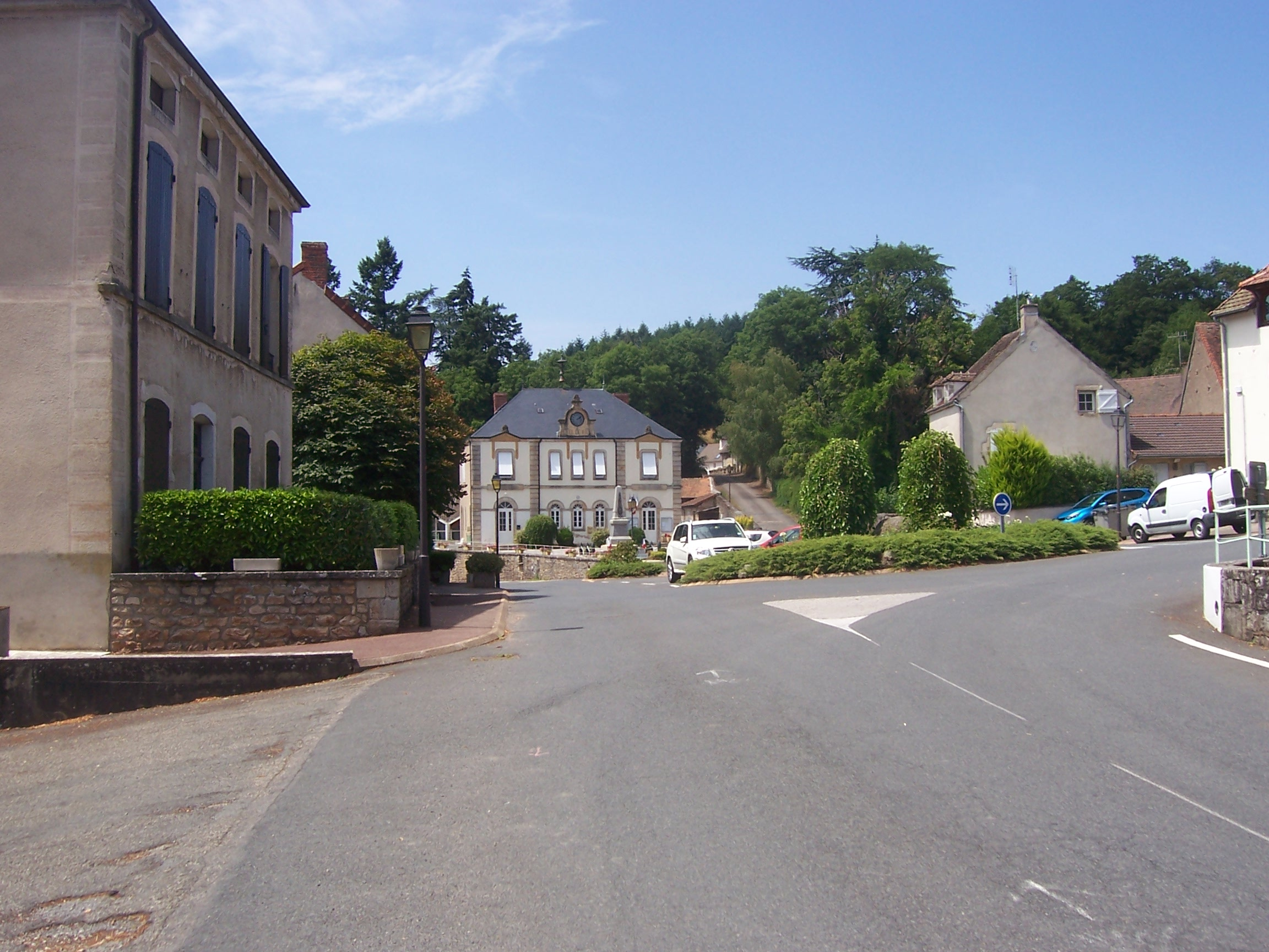 Mairie de La Guiche